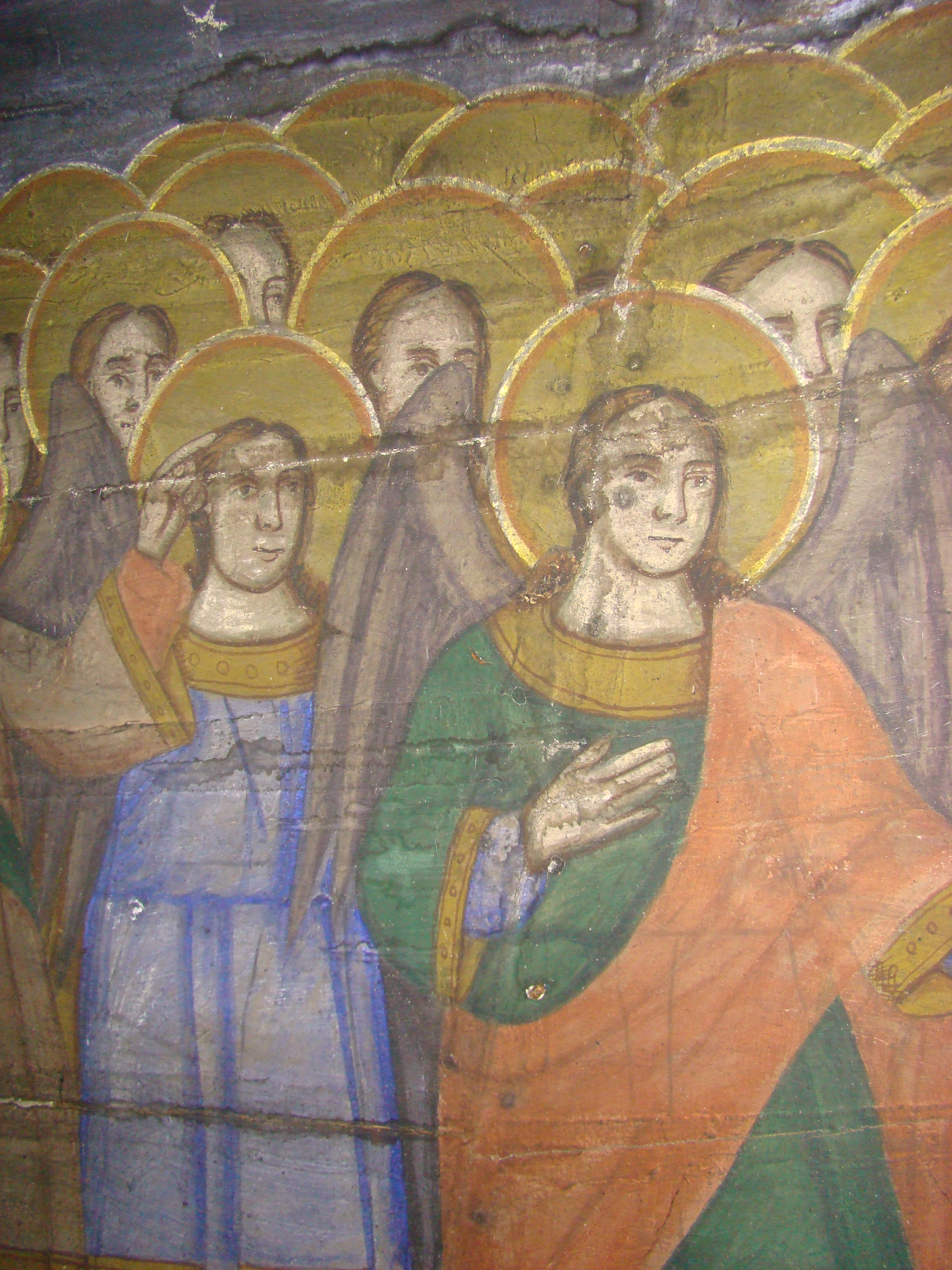 Biserica de lemn „Sfinții Arhangheli Mihail și Gavriil” din Țărmure, județul Arad